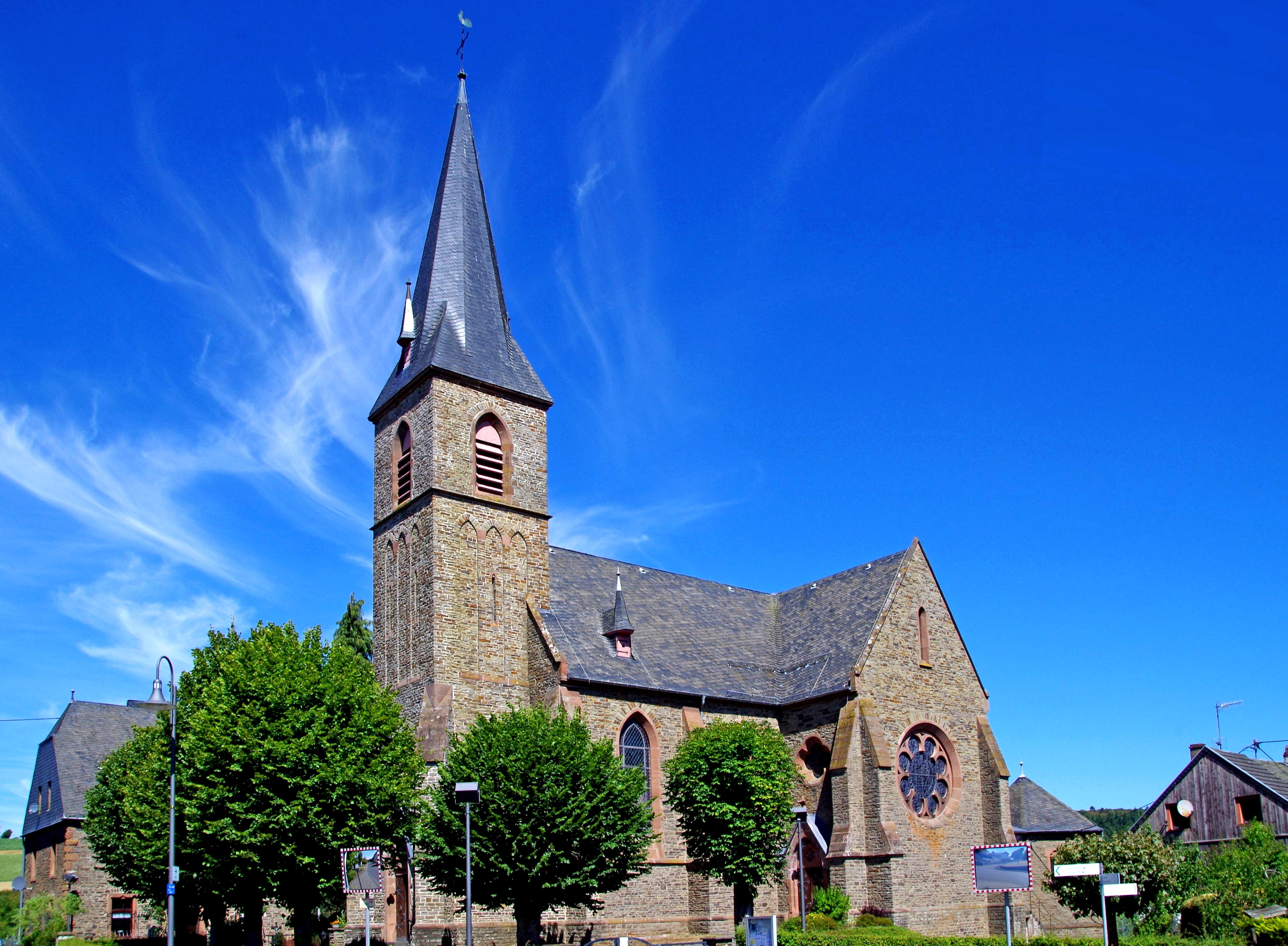 Oberehe, St. Jakob